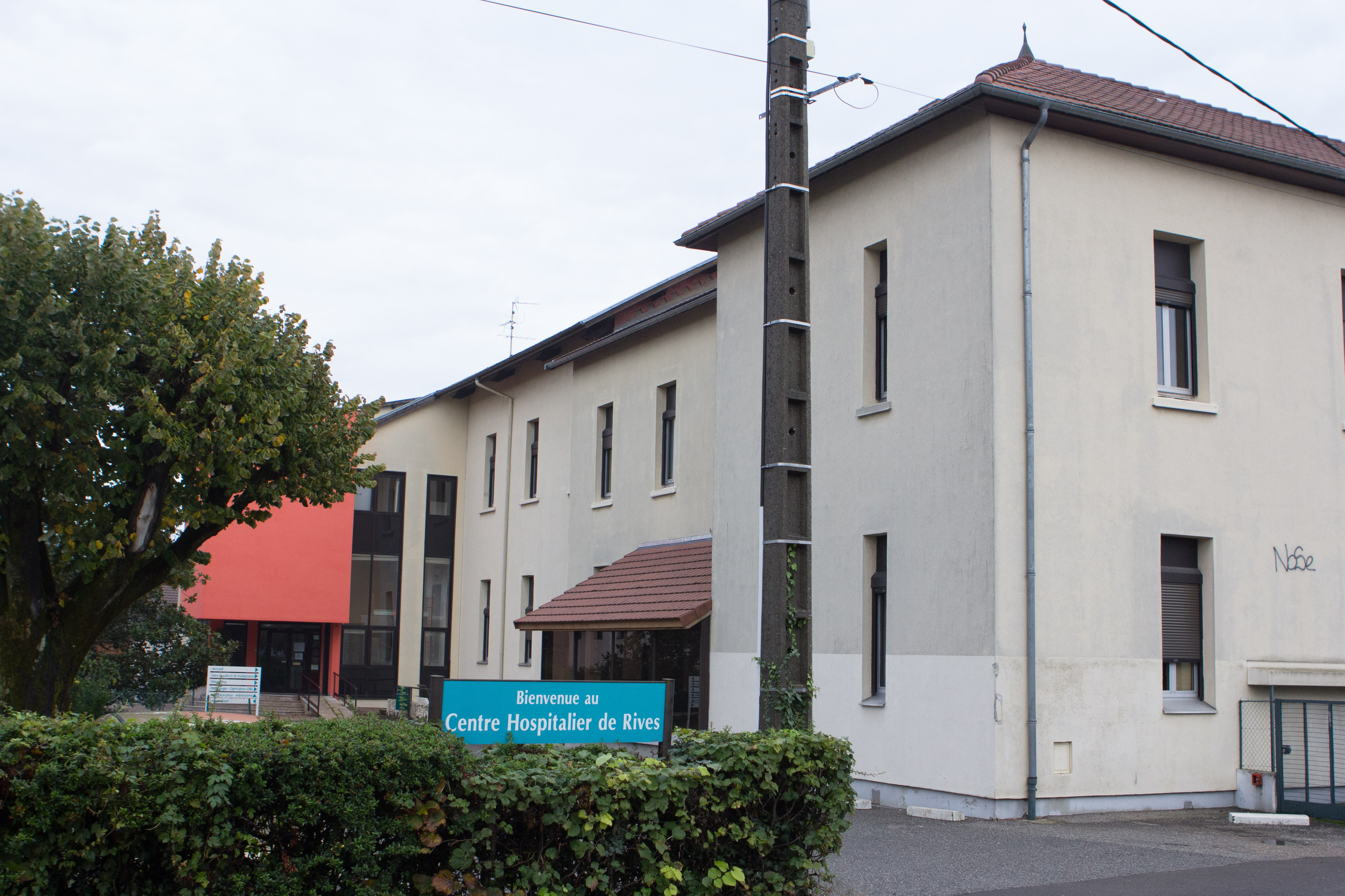 Centre hospitalier de Rives / Rives, Isère, France